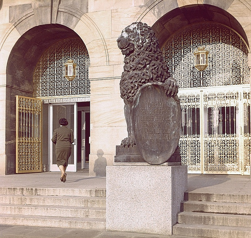 Original image description from the Deutsche Fotothek Dresden. Rathaus, einer der beiden Schildlöwen von Georg Wrba vor dem Eingang